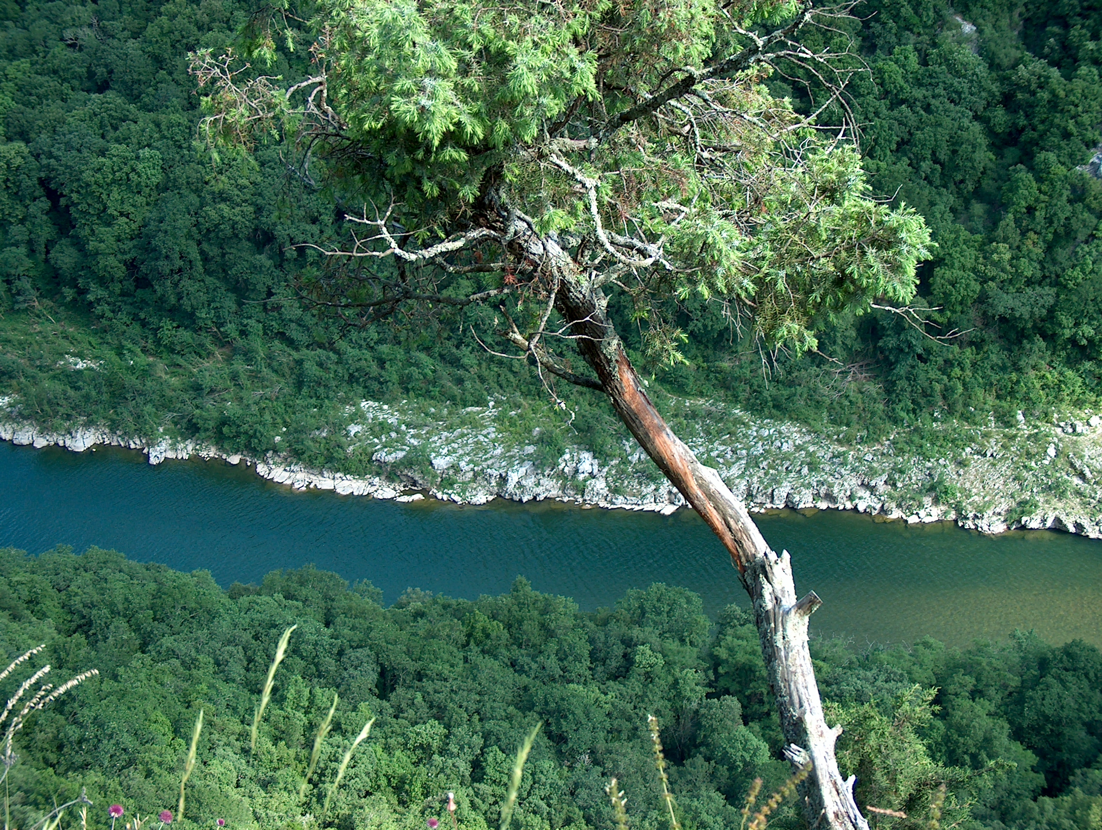 La rivière Ardèche.